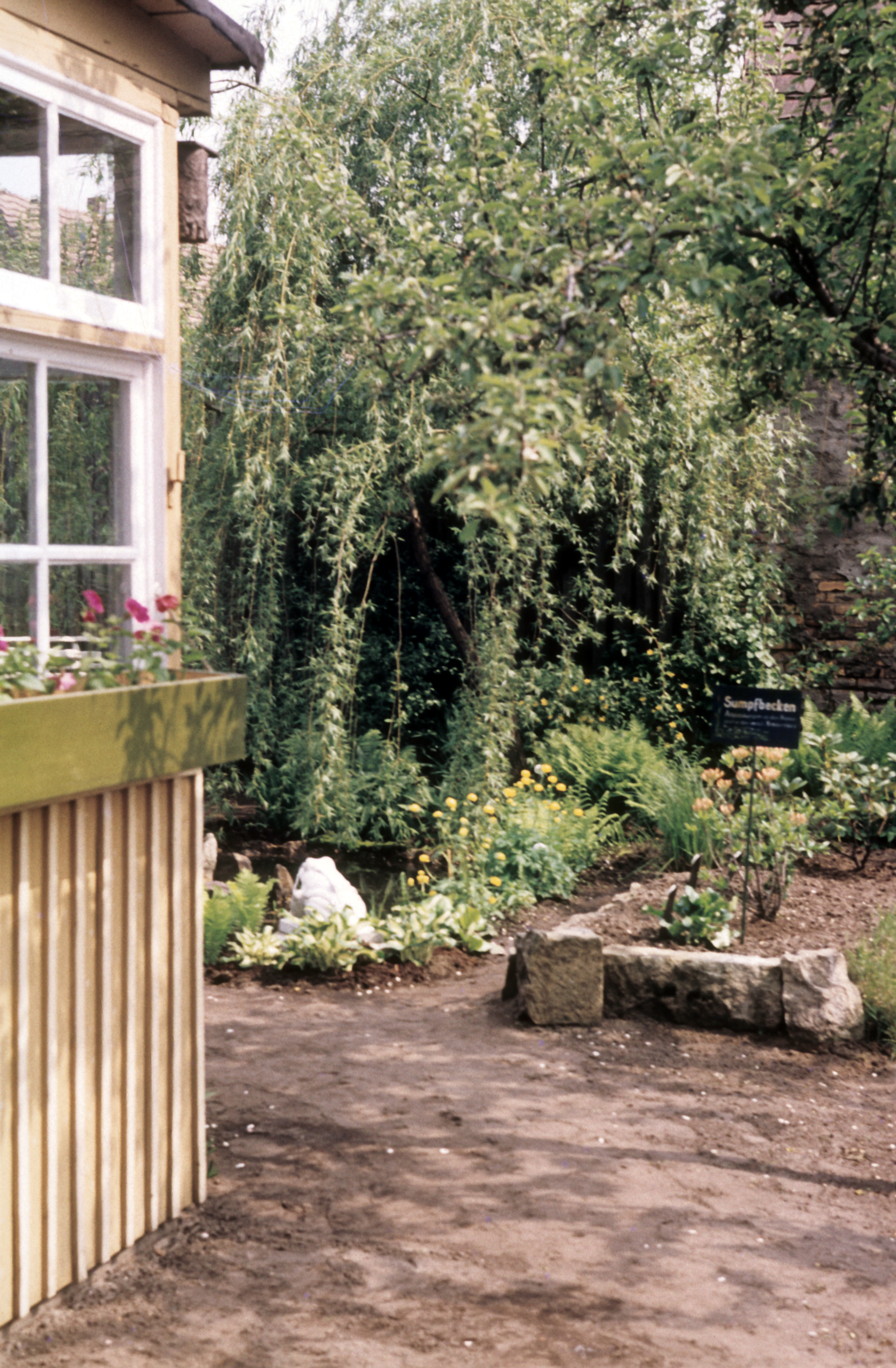 Ruhland, Hartwigstraße, Schulgarten, Teilansicht (bei der Laube, vor dem Sumpfpflanzenbeet))